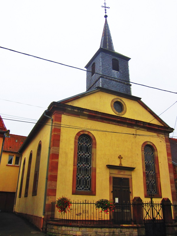 Temple Mittersheim